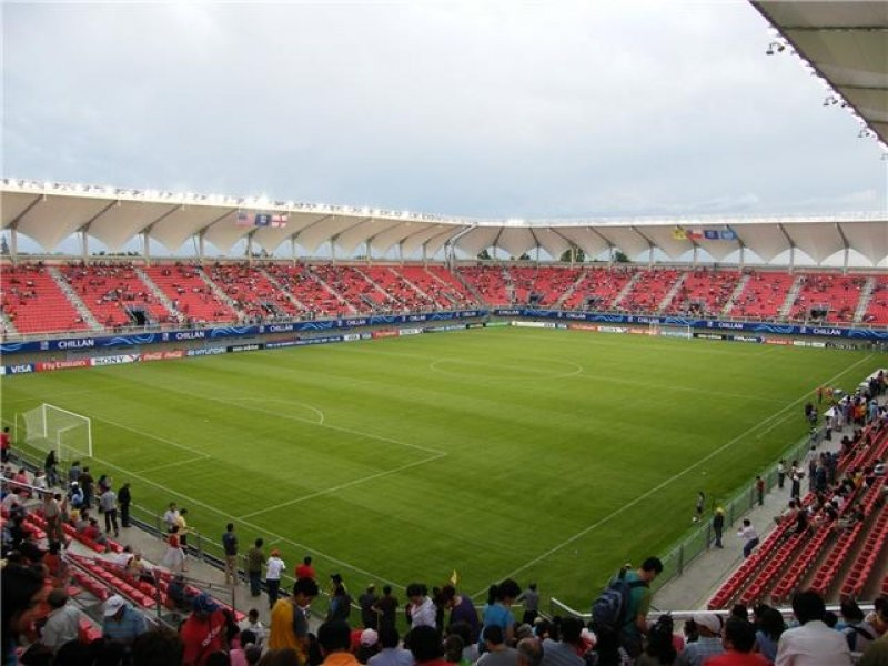 Estadio ubicado en la ciudad de Chillán, cuyo nombre se debe a su antiguo director técnico ya fallecido, considerado uno de los más grandes por los hinchas del club.